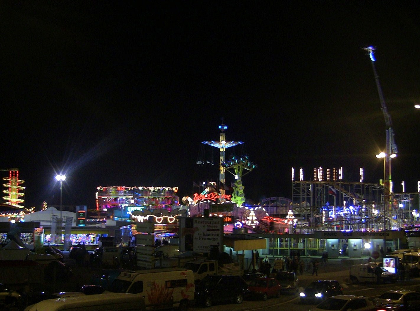 La foire comtoise de Besançon (Doubs, France).